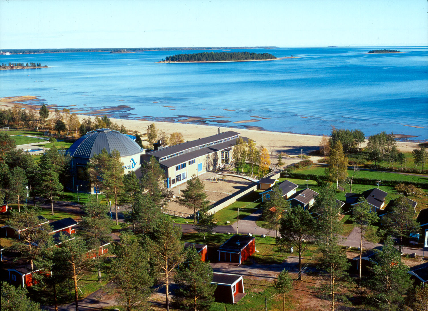 Akva huset mot havet